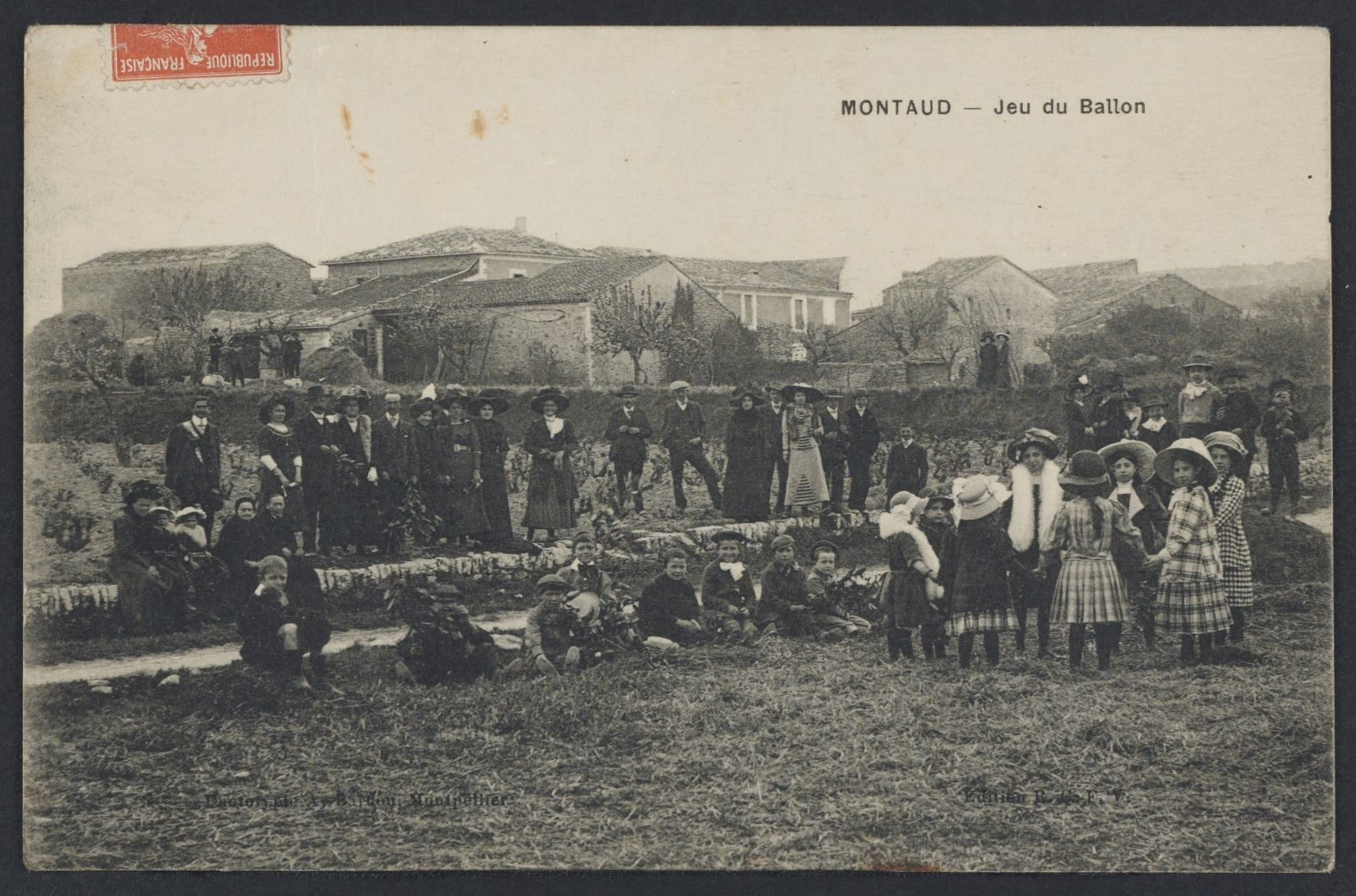 Montaud. - Jeu du ballon : carte postale.